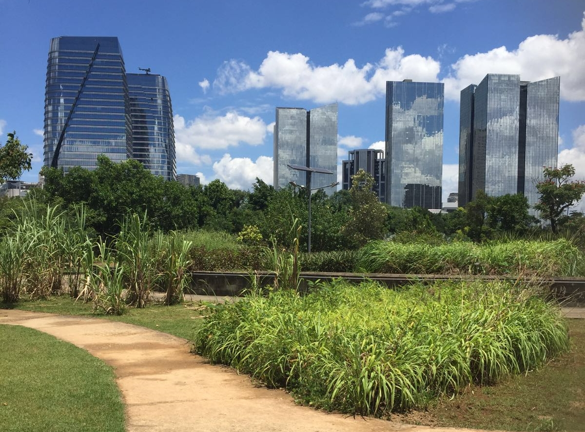 PARQUE DO POVO